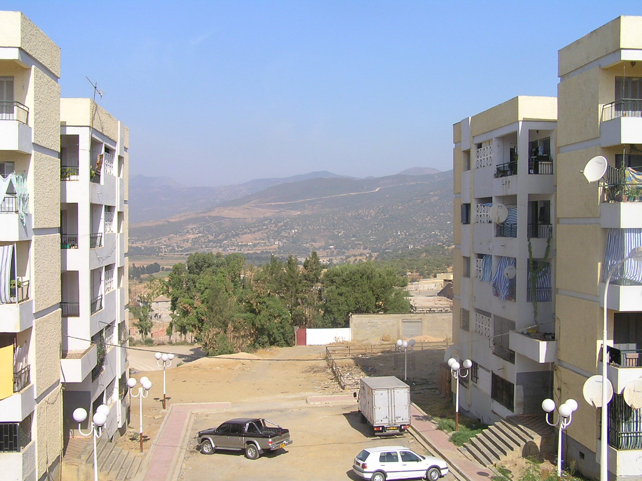 View, Lakhdaria, Algeria